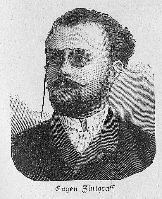 Jahrbuch der Berliner Morgenzeitung, Kalender 1899, S. 287 Scan --Goerdten 10:18, 15. Jan. 2007 (CET)